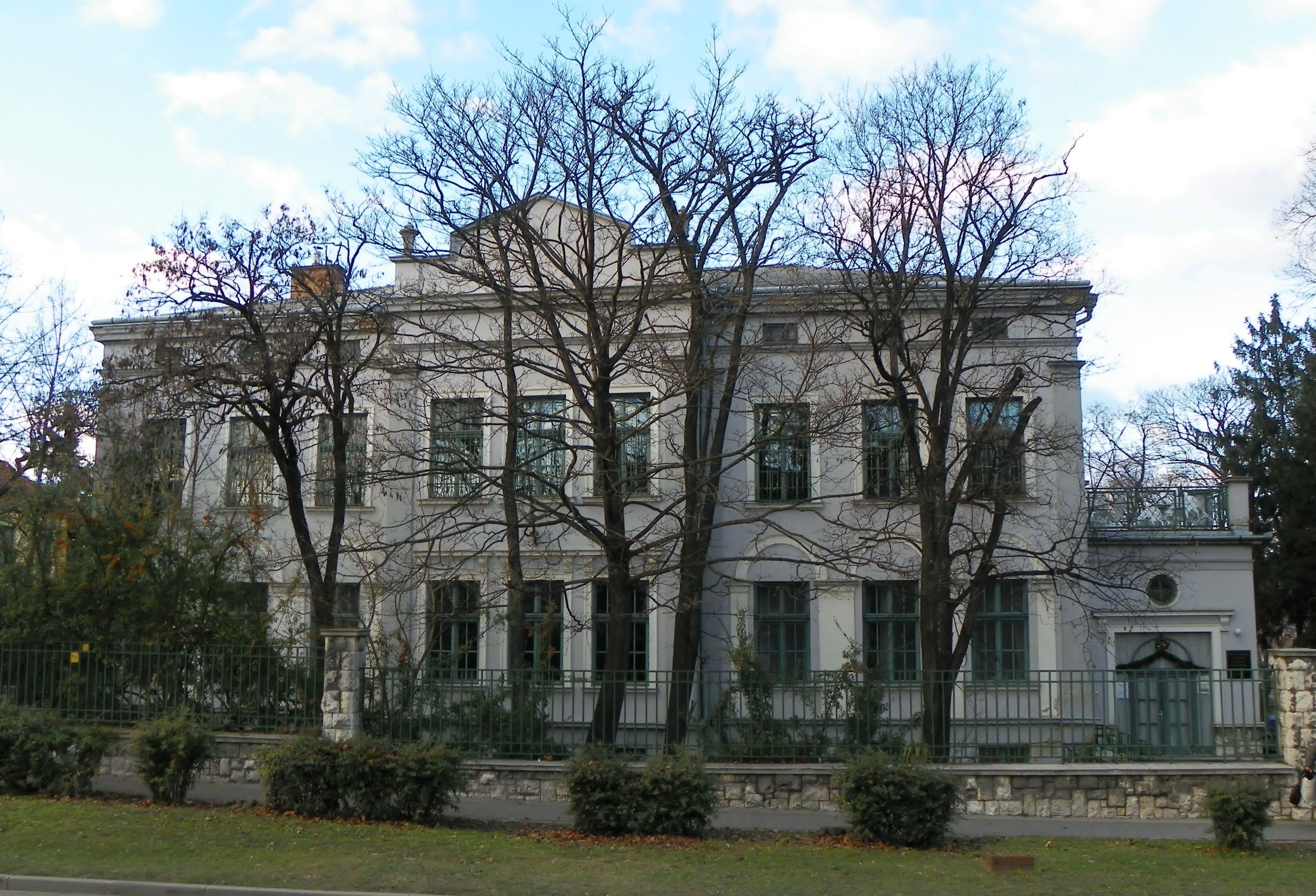 a Simor kórház épülete